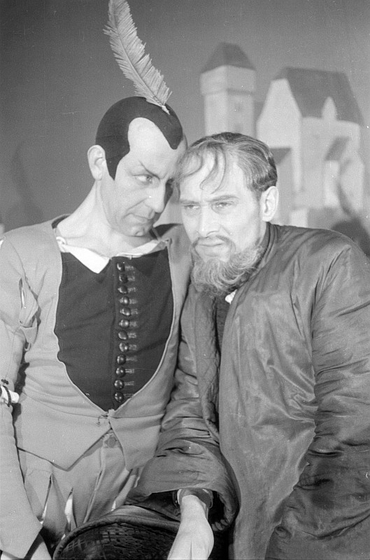 Original image description from the Deutsche Fotothek Szenenbilder "Urfaust" mit Otto Eduard Hasse als Mephisto